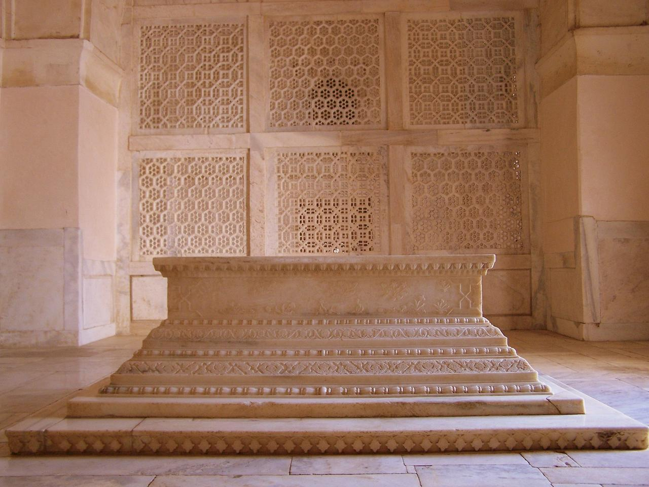 Akbar's daughter Shakrunissa's grave